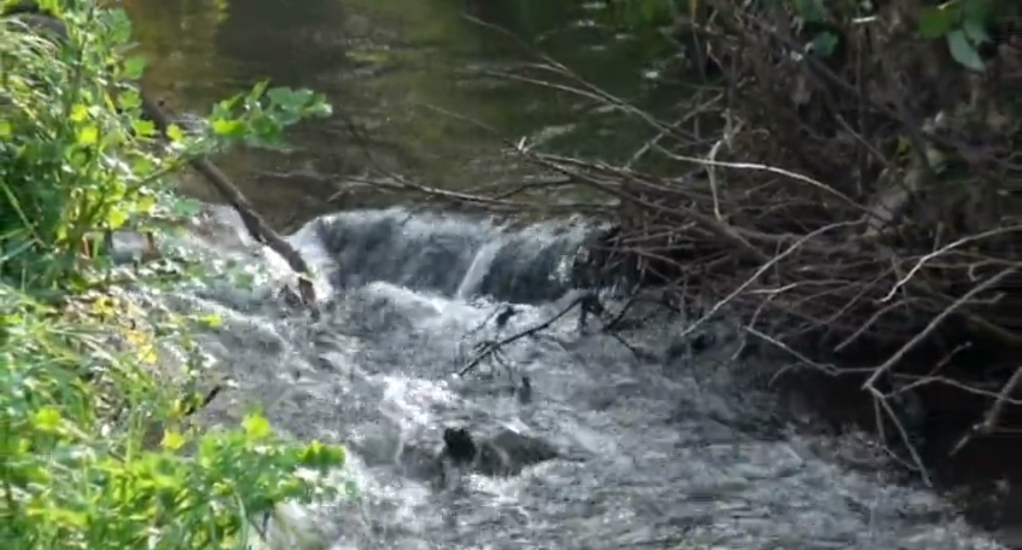 Fotografía del Río Pielgo en Antromero.